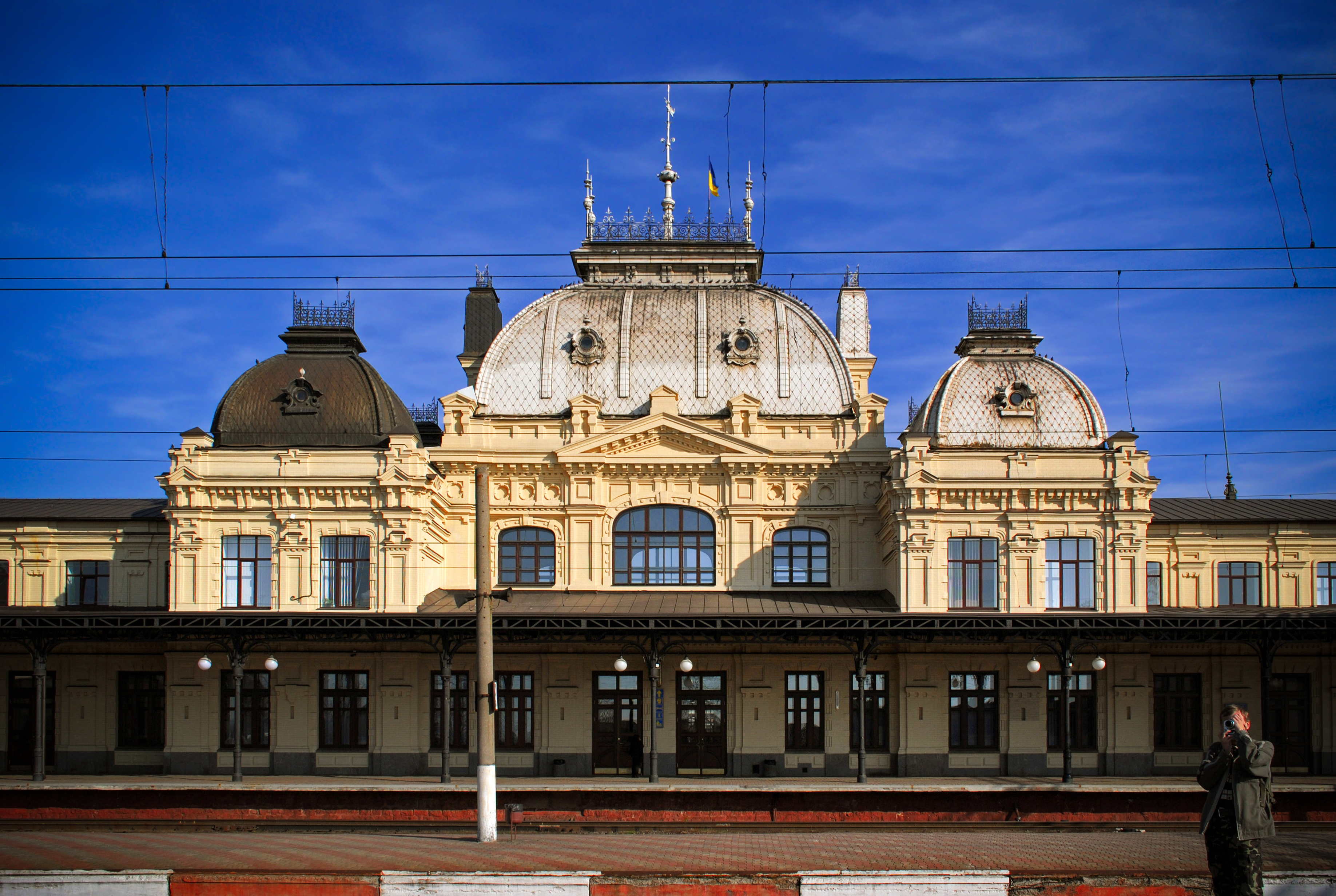 Залізничний вокзал, Жмеринка, вул. Вокзальна